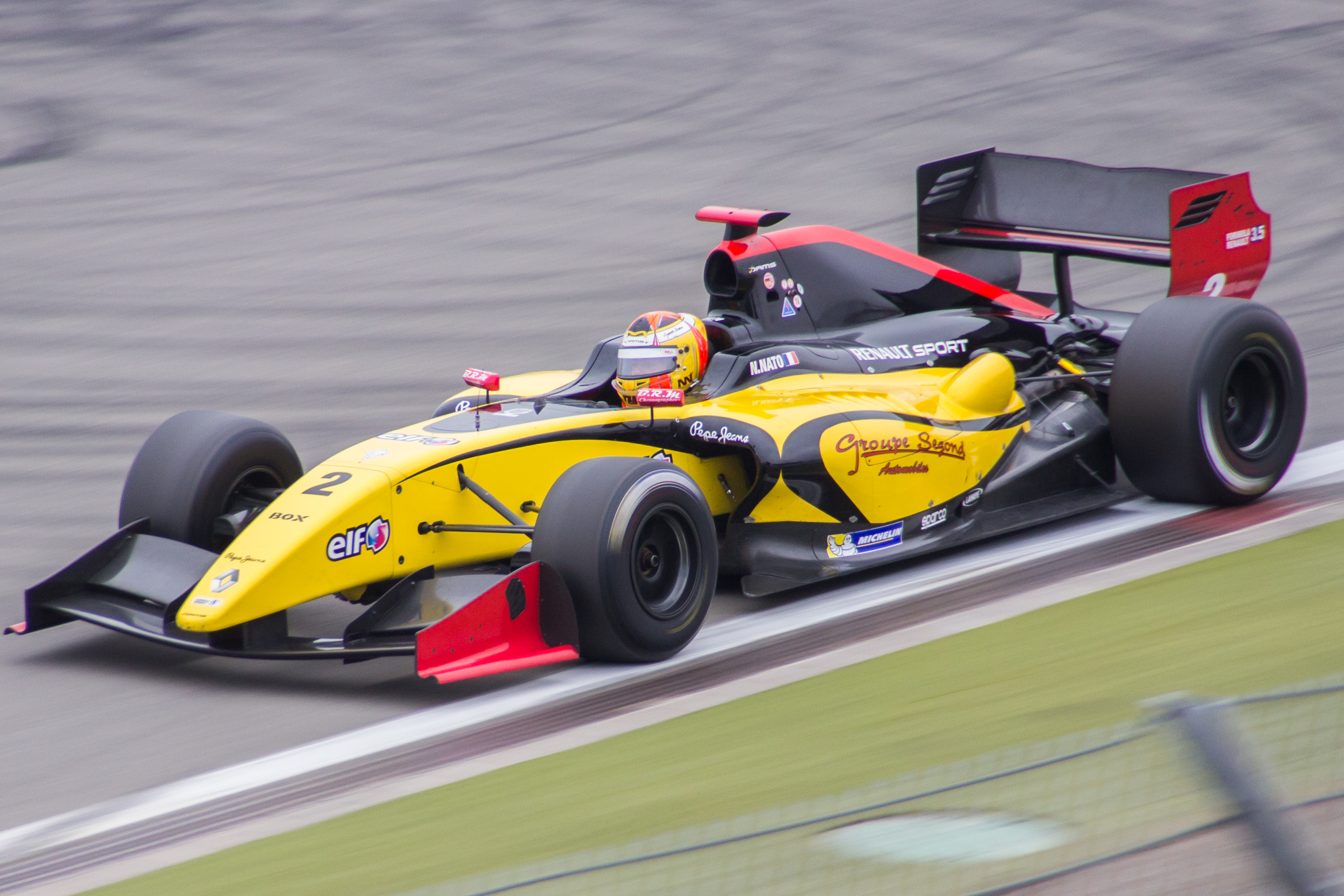 Norman Nato beim ersten Rennen der Formel Renault 3.5 auf dem Nürburgring 2014